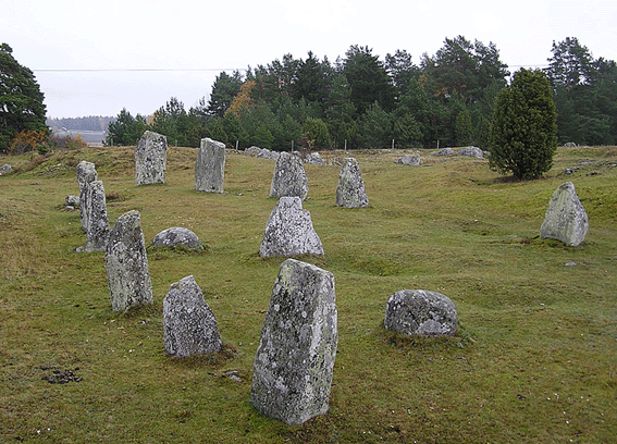 Bild klafui